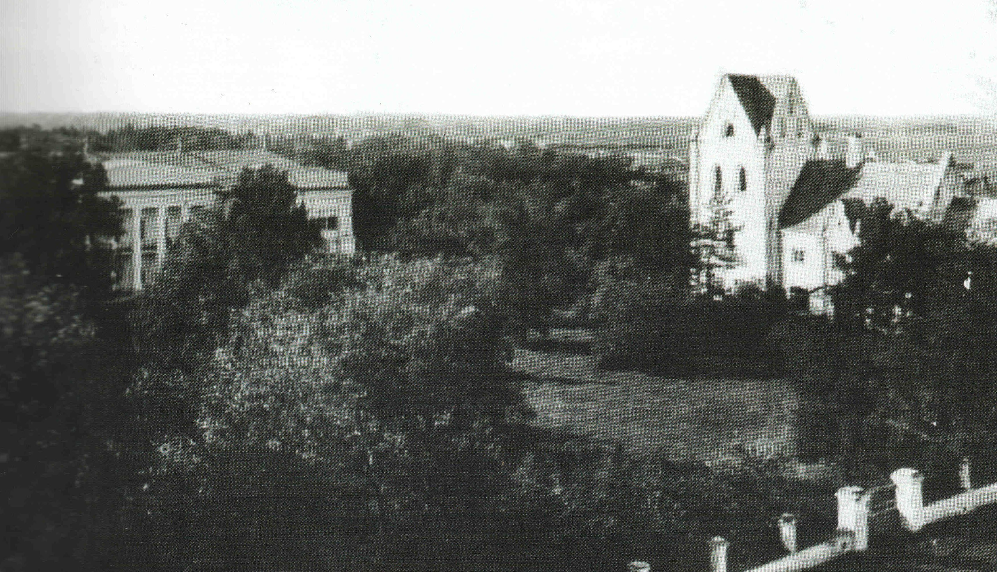 фото